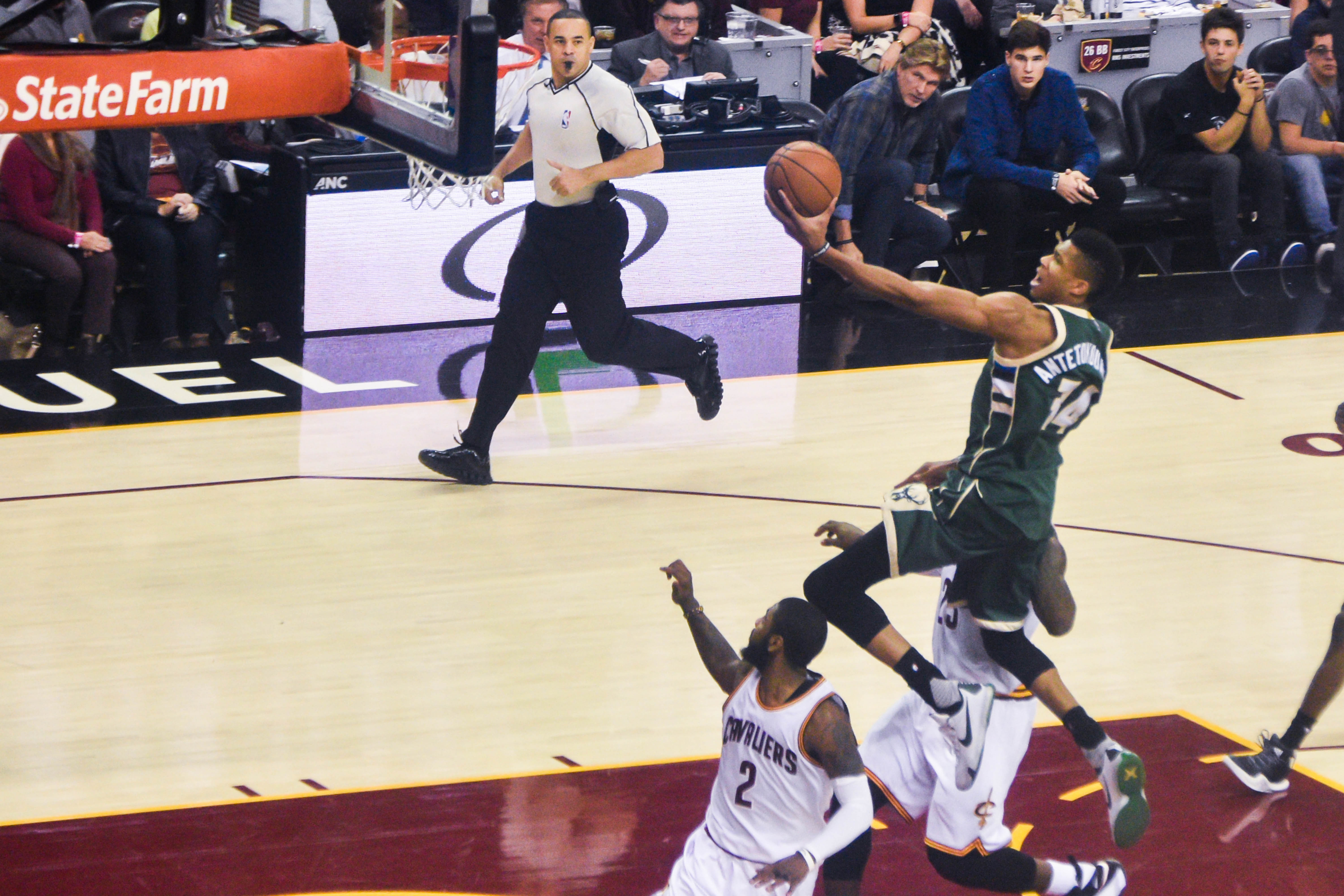 Giannis Antetokoummpo